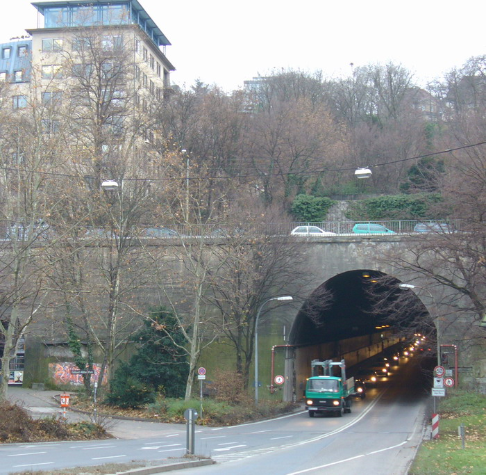 Stuttgart Wagenburgtunnel Selbst fotografiert von user:Enslin At 6 Jan 2006 in Stuttgart